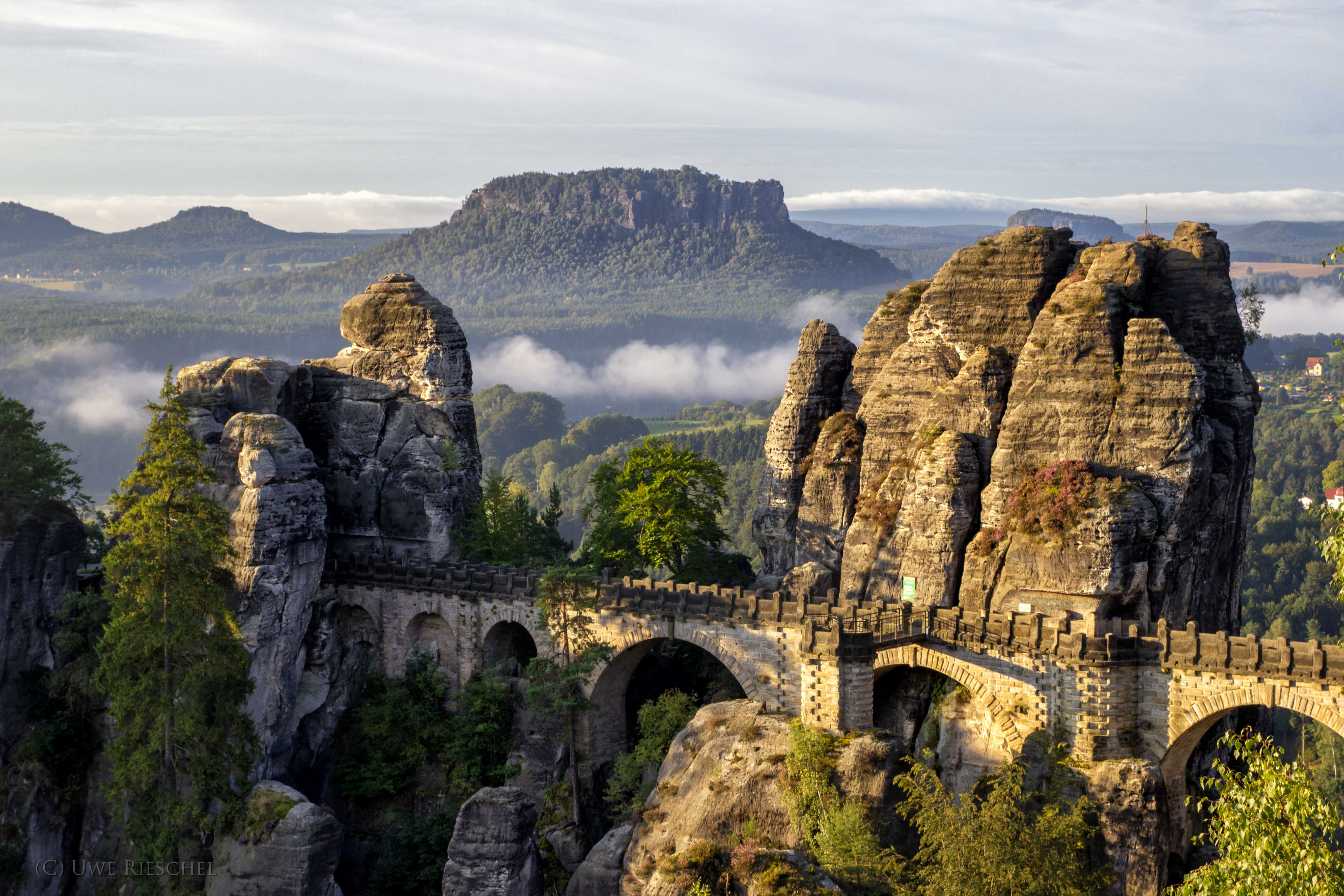 Die Basteibrücke über der Elbe, in der sächsischen Schweiz